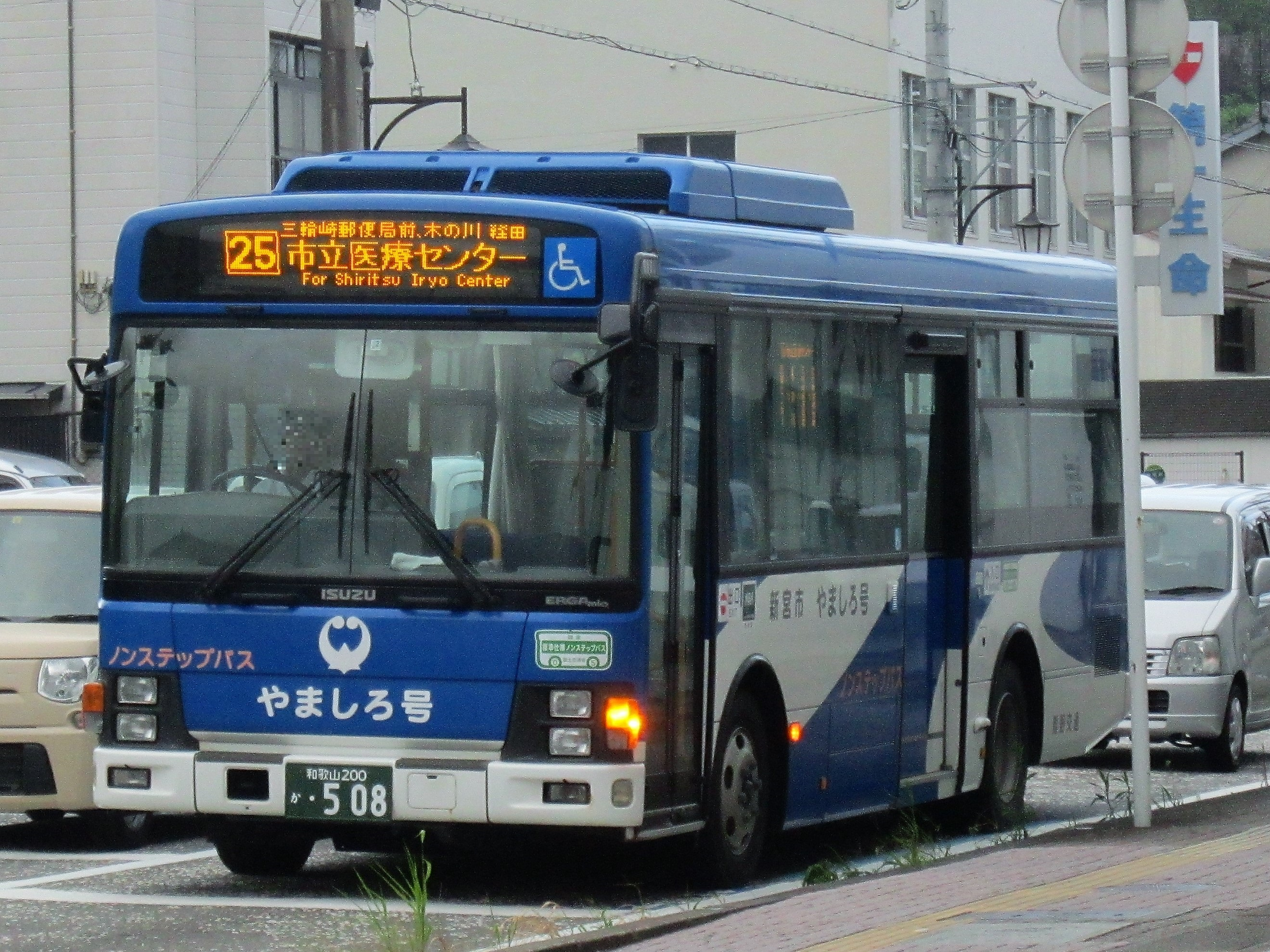 新宮市内を走行する熊野交通「新宮市やましろ号」